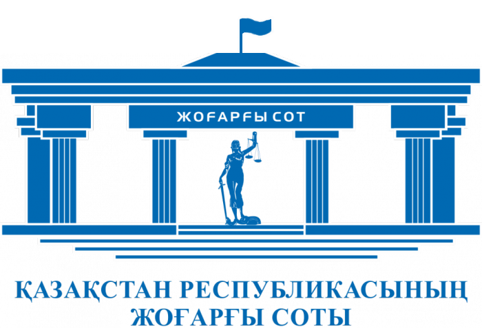 логотип Верховного Суда Республики Казахстан